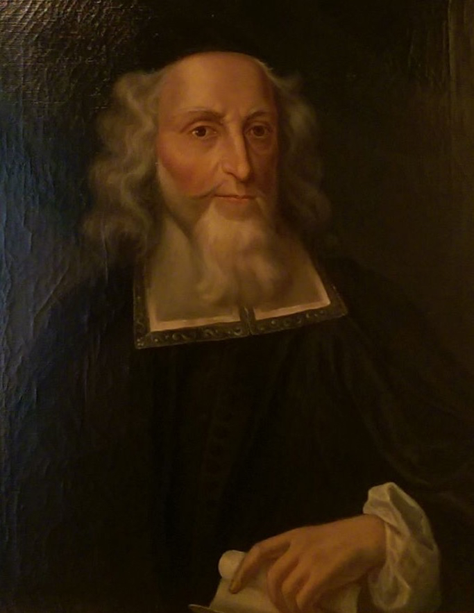 Samuel Oppenheimer